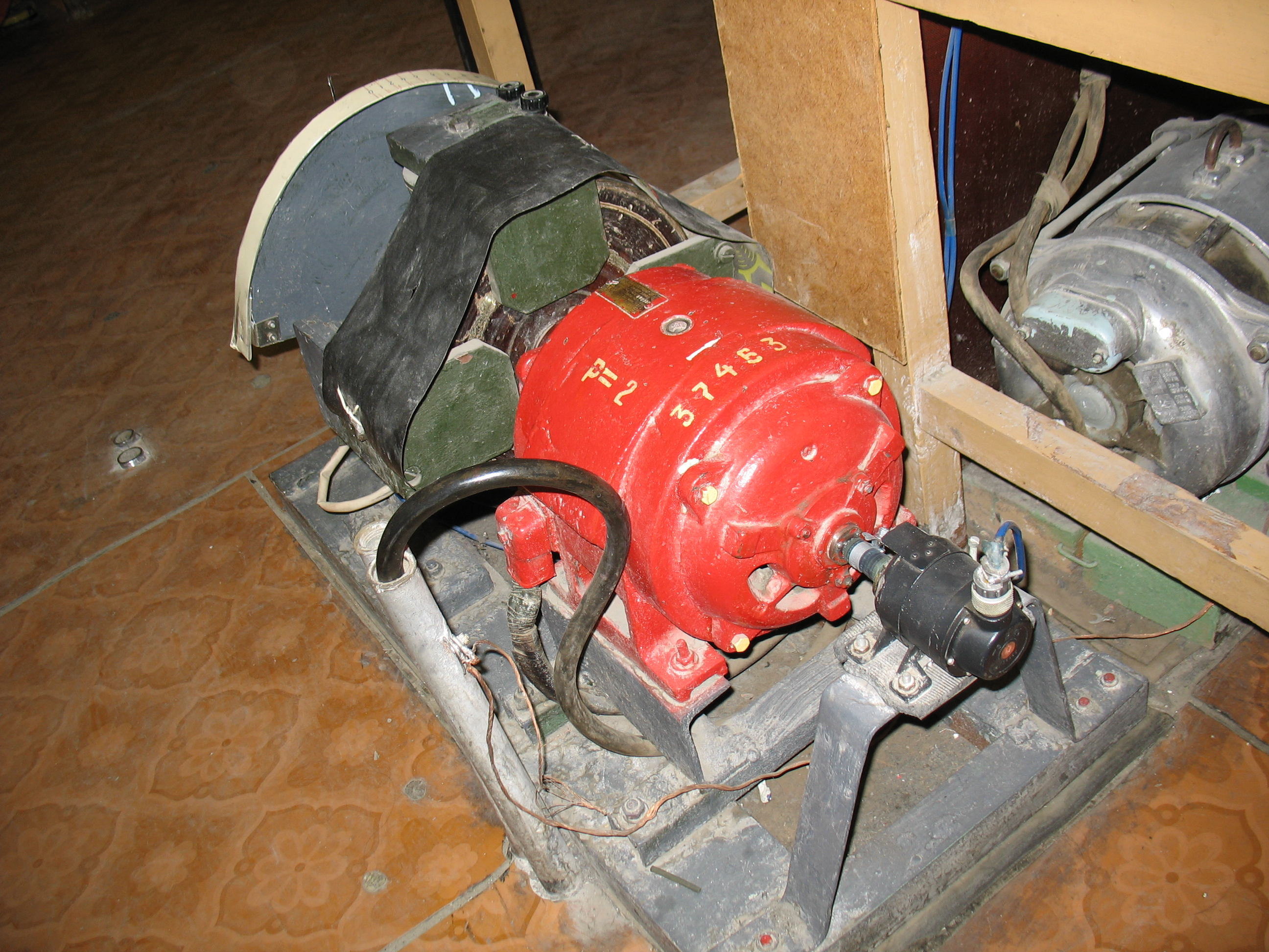 Тахогенератор на валу асинхронного двигателя на испытательном стенде, УГЛТУ 2008 год, каф. энергетики.